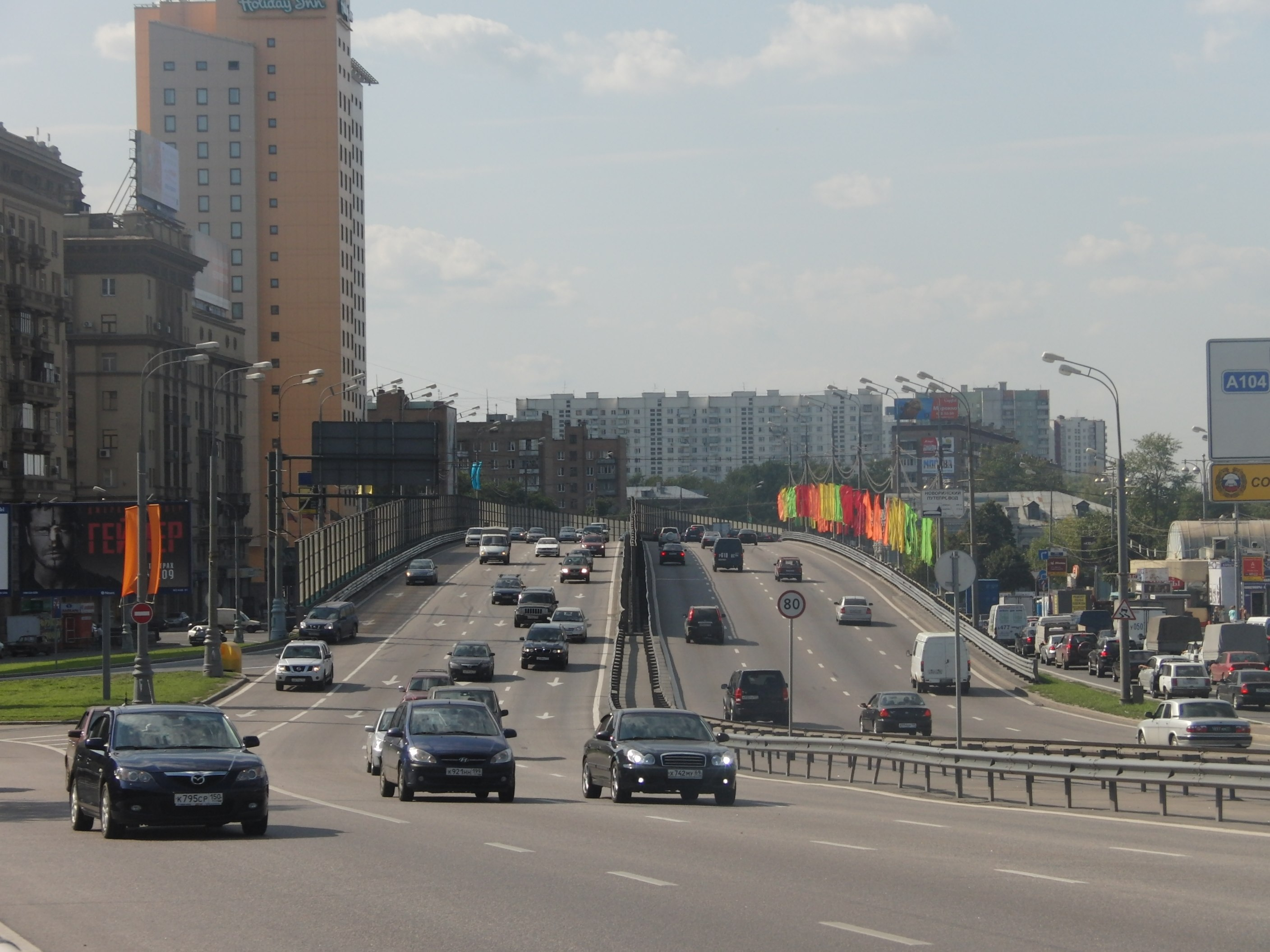 The third ring road // Короткий наземный участок ТТК между Рижской и Новорижской (на фото) эстакадами. Слева - Второй Крестовский переулок